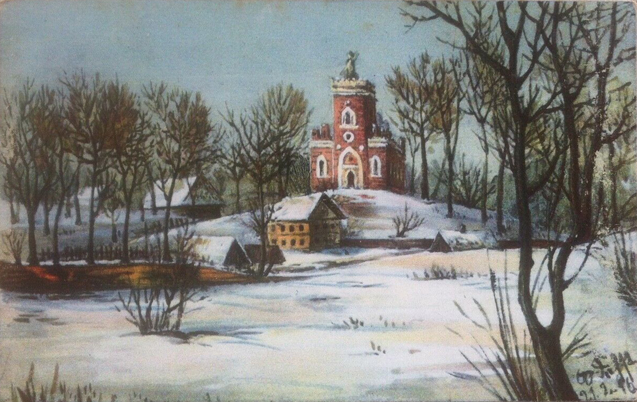 Беларуская (тарашкевіца): Райца (Rajca). Царква Сьвятога Спаса